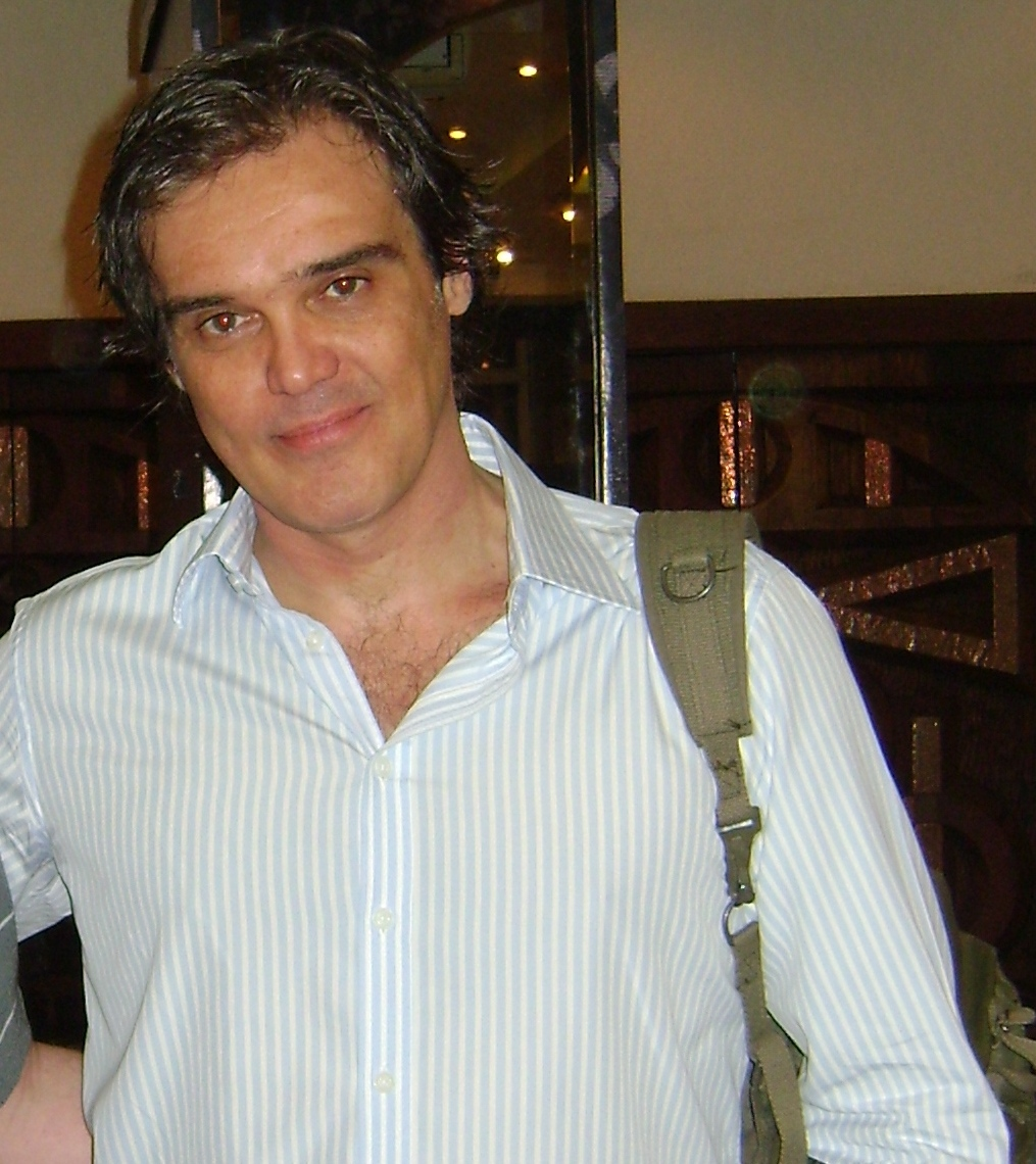 Dalton Vigh, ator brasileiro, após a apresentação da peça "Vamos?", em São Paulo.